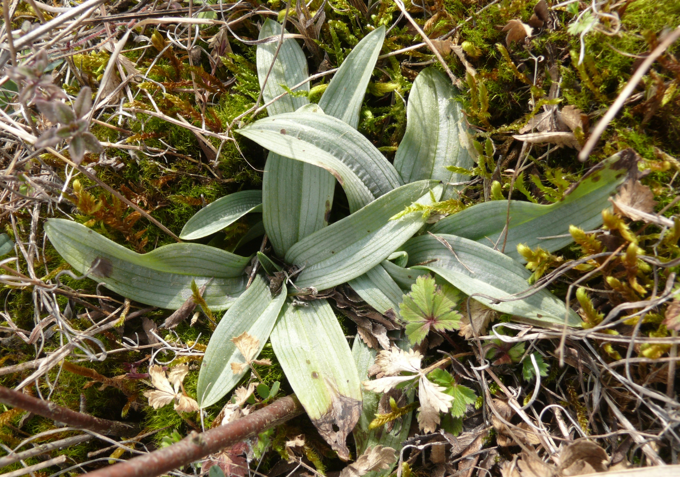 Ophrys araneola, Tauberland, Germany